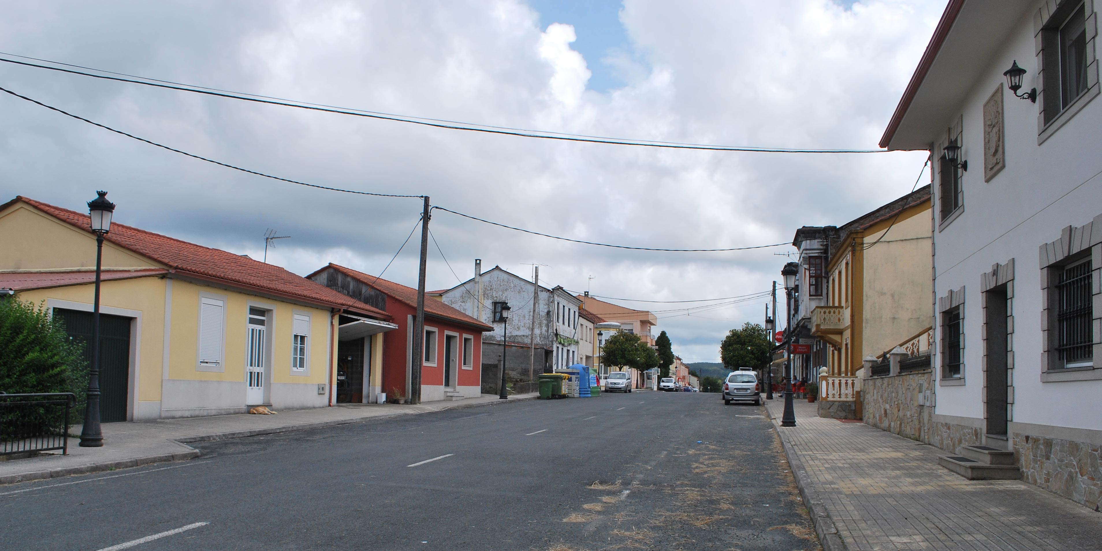 Estrada AC-193 ao seu paso por Foro (Présaras, Vilasantar)